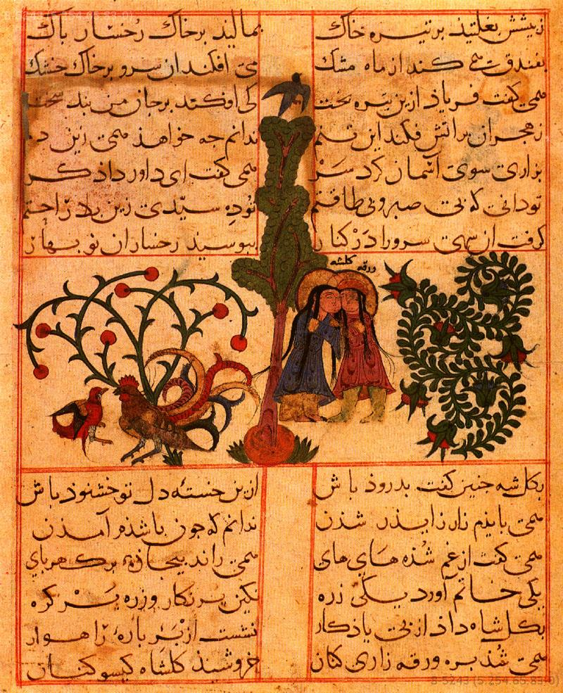 Varka ile Gülşah mesnevisinin minyatürleri. Topkapı Sarayı Kütüphanesi’nde bulunan 71 minyatürlü Farsça bir el yazması ve nakkaşı 58b yaprağında adı yazılı olan Abdülmümin El Hoyi’dir. 13. yy başlarında Konya’da yapılan minyatürler Anadolu Selçuklu sanatına aittir.